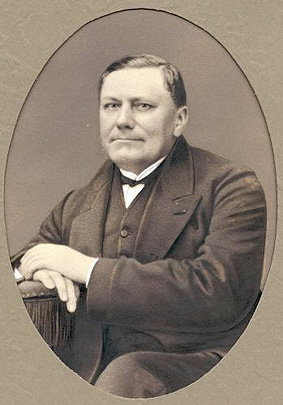 Jhr.Mr. W.E. Engelen (1817-1879)